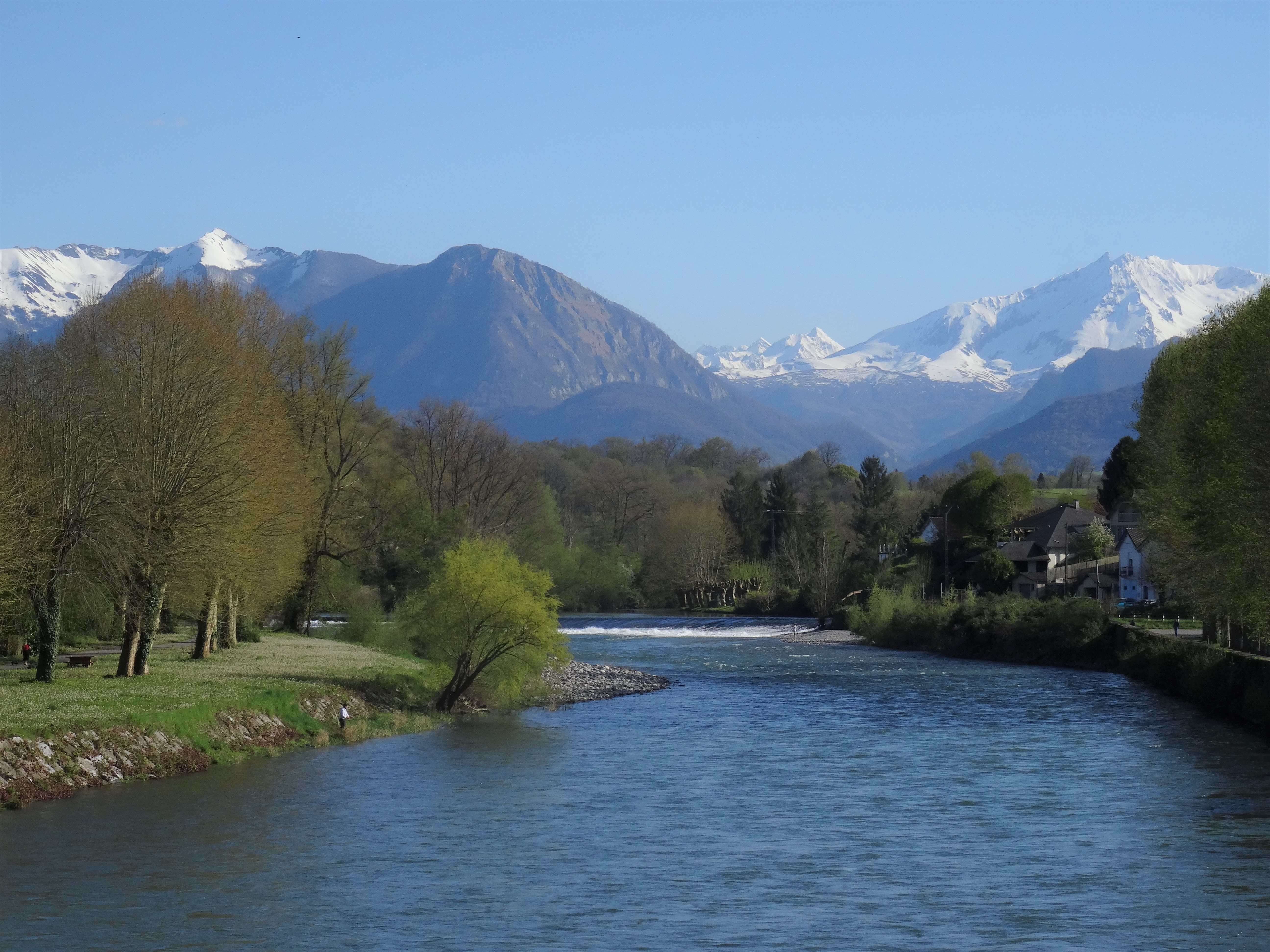 Le Gave de Pau et le Pyrénées depuis Nay.